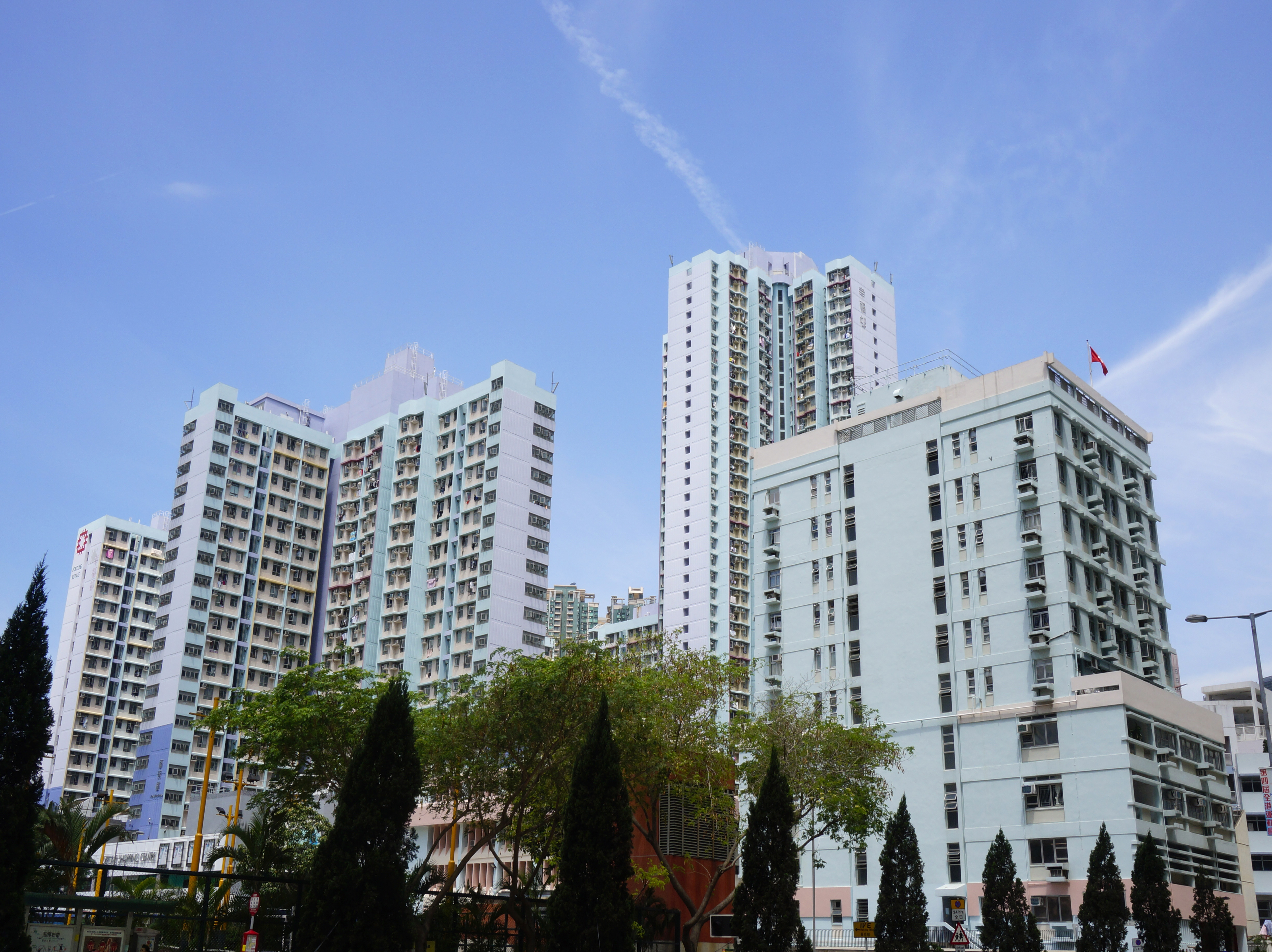 幸福邨各座大廈